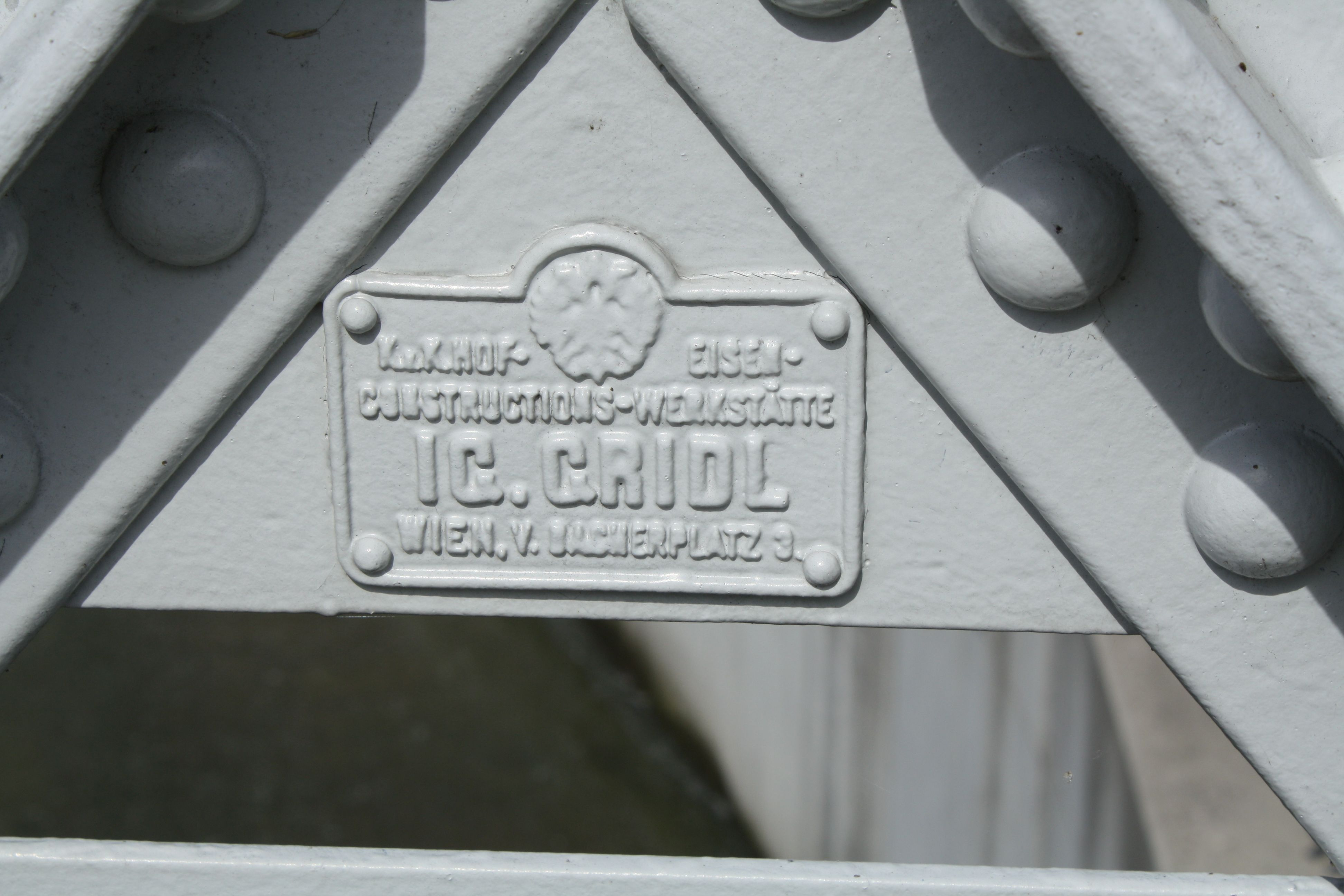 Herstellertafel in niederösterreichischen Brücken der Fa. IG.Gridl (Ignaz Gridl), in diesem Fall am Wienerwaldsee